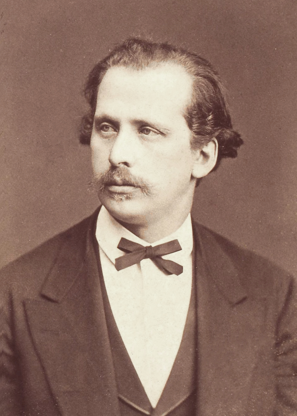 Nicolas Rubinstein : [Pianiste]